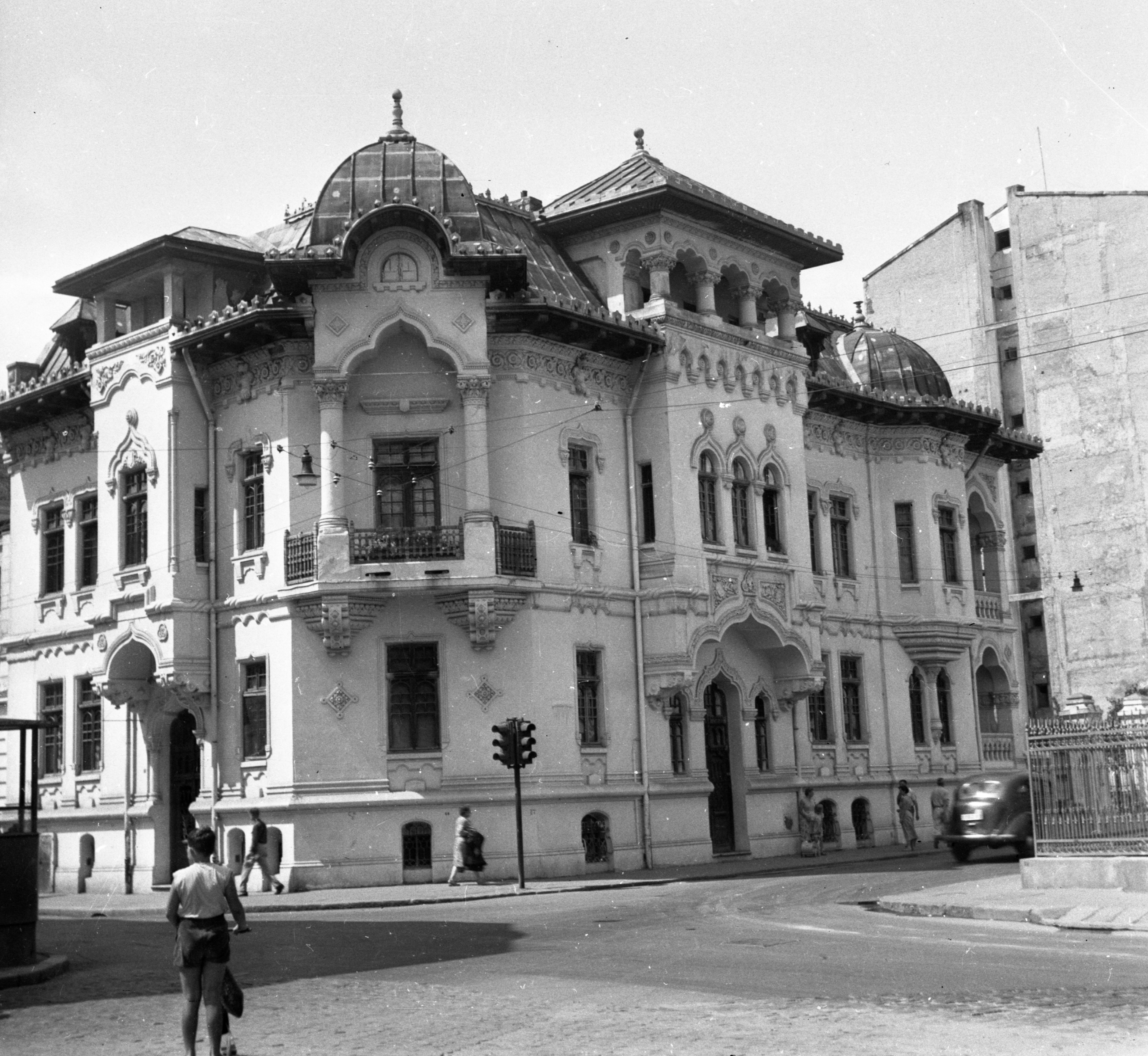 Strada C. A. Rosetti - Strada Nicolae Golescu sarok. Location: Romania, Bucharest Tags: signal, firewall, balcony, architecture, street view Title: Strada C. A. Rosetti - Strada Nicolae Golescu sarok.